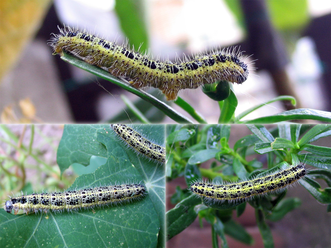 Beschreibung: Raupe des großen Kohlweißlings (Pieris brassicae) Fotograf: Darkone, 17. August 2004